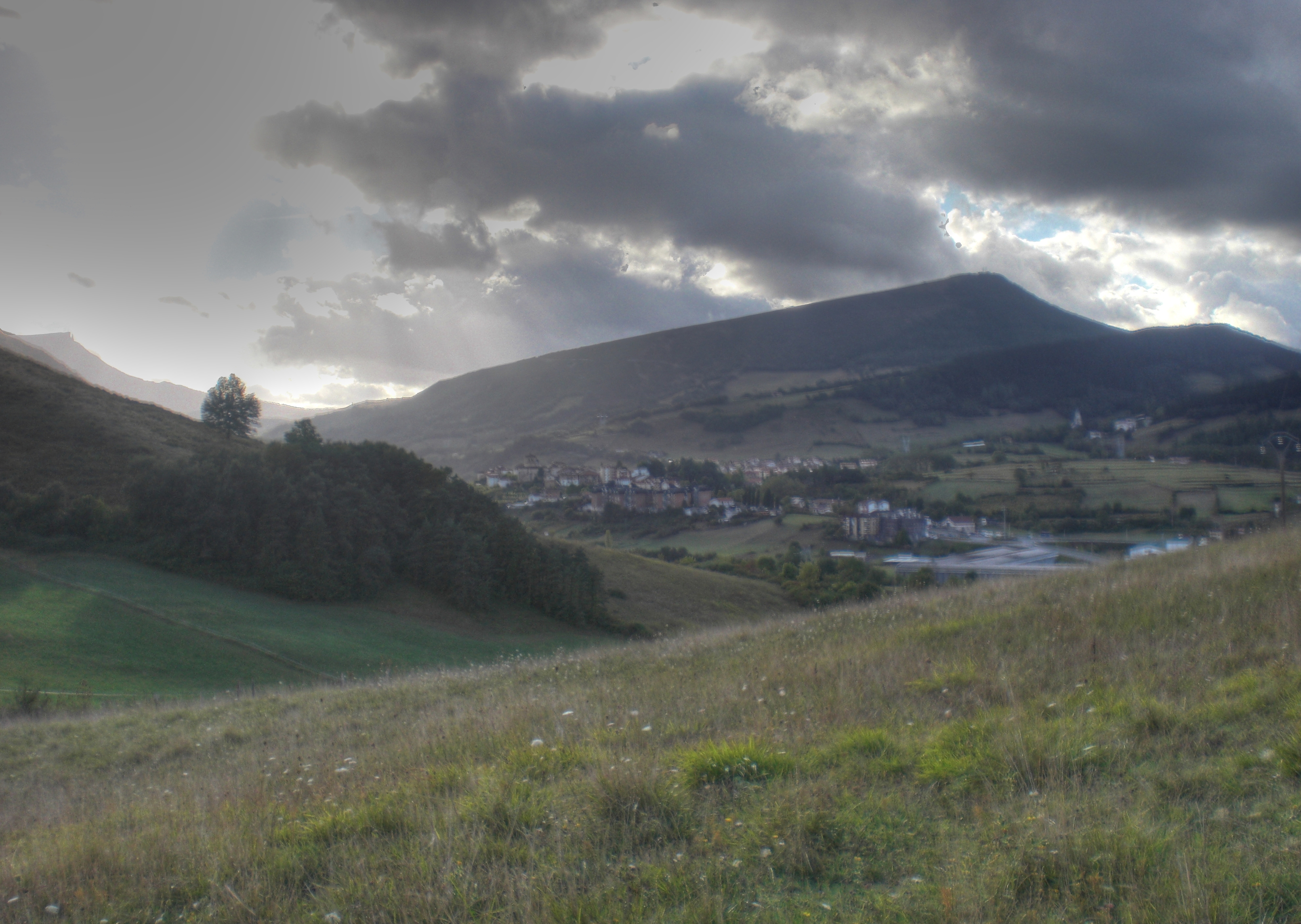 Artziniegako ikuspegia Lantenotik gertu